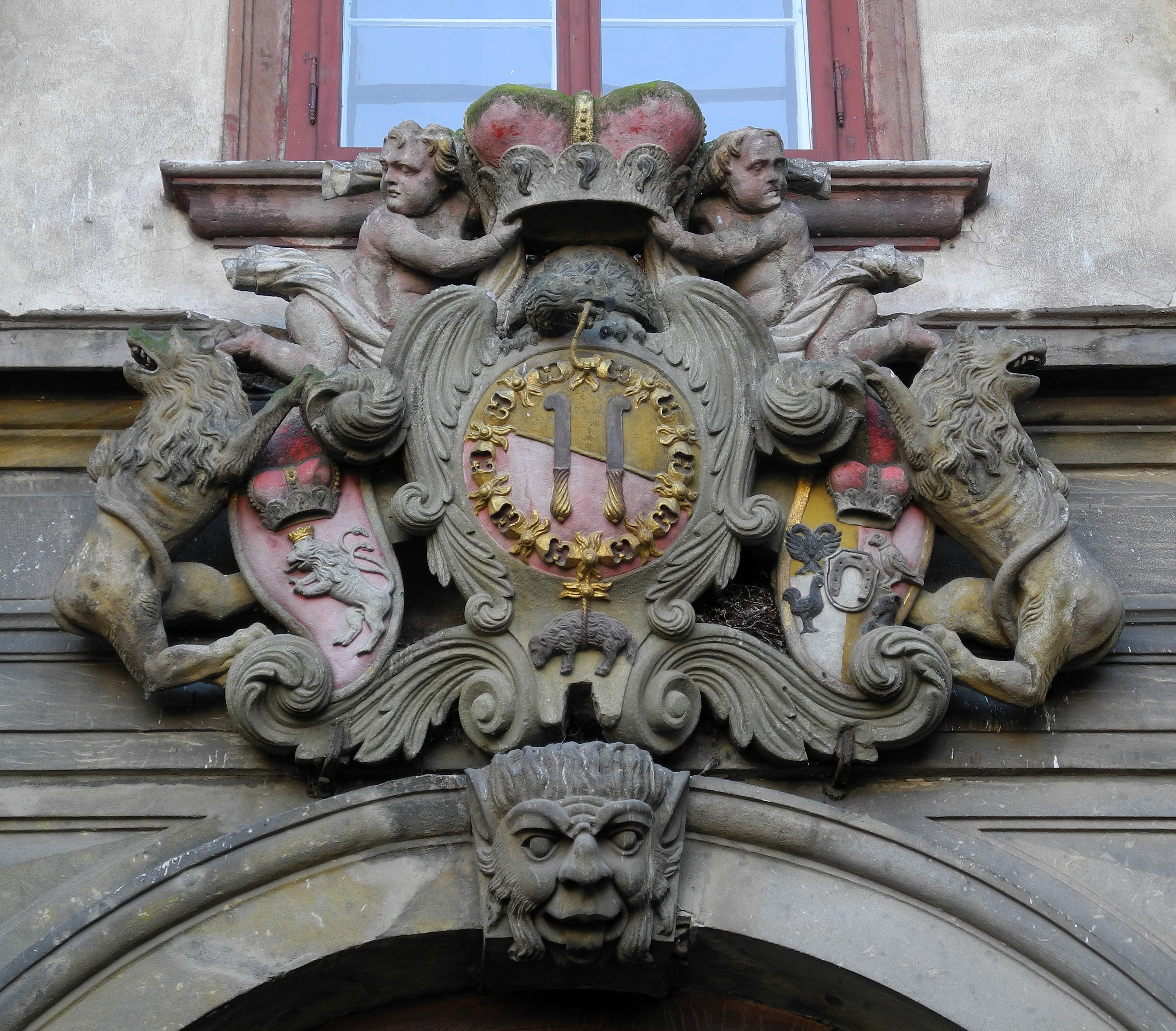 Dietrichstein-Wappen am Portal von Schloss Libochowitz (Libochovice)